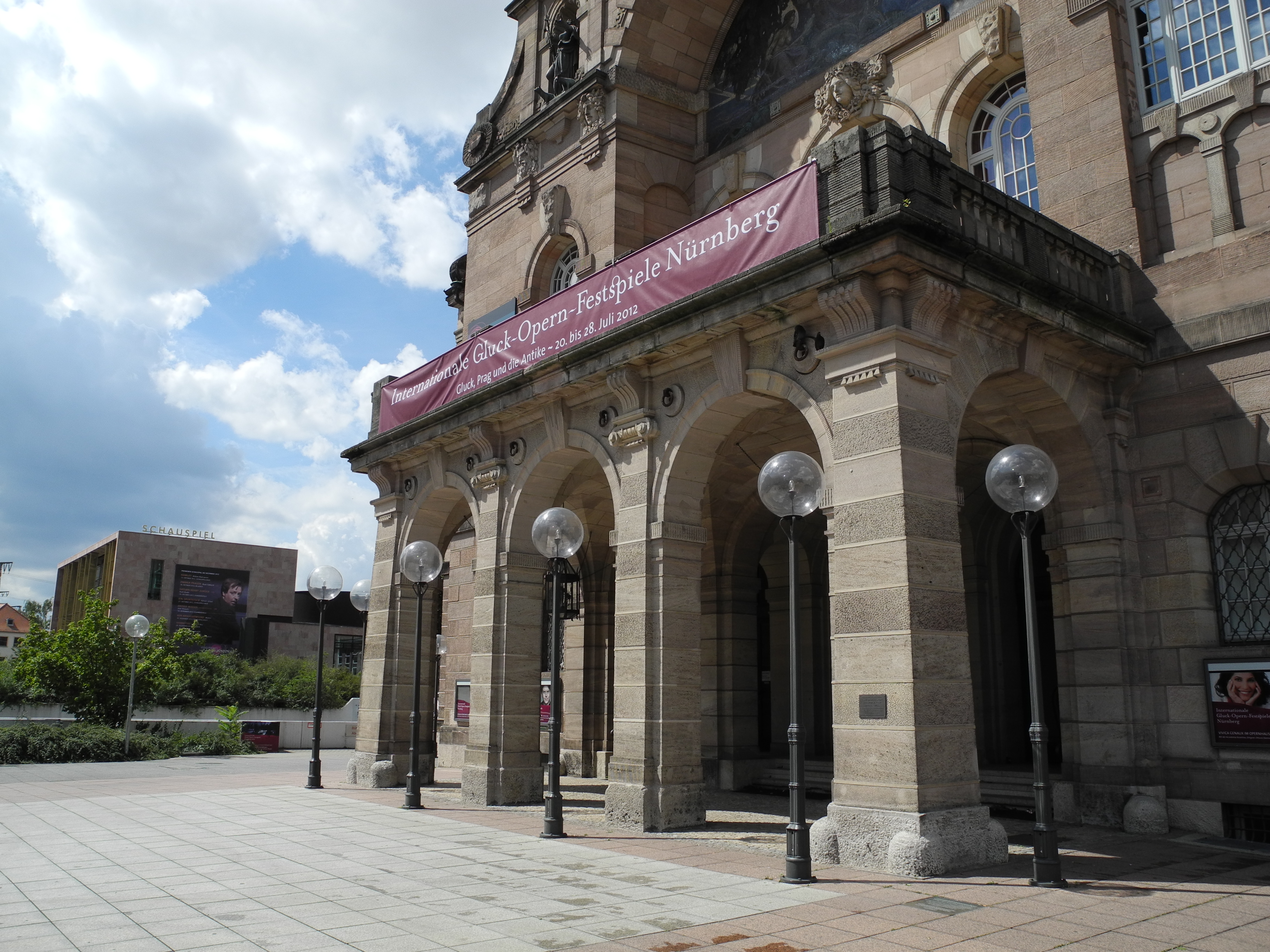 Opern- und Schauspielhaus am Staatstheater Nürnberg, Ansicht vom Opernhaus in Blickrichtung Süden